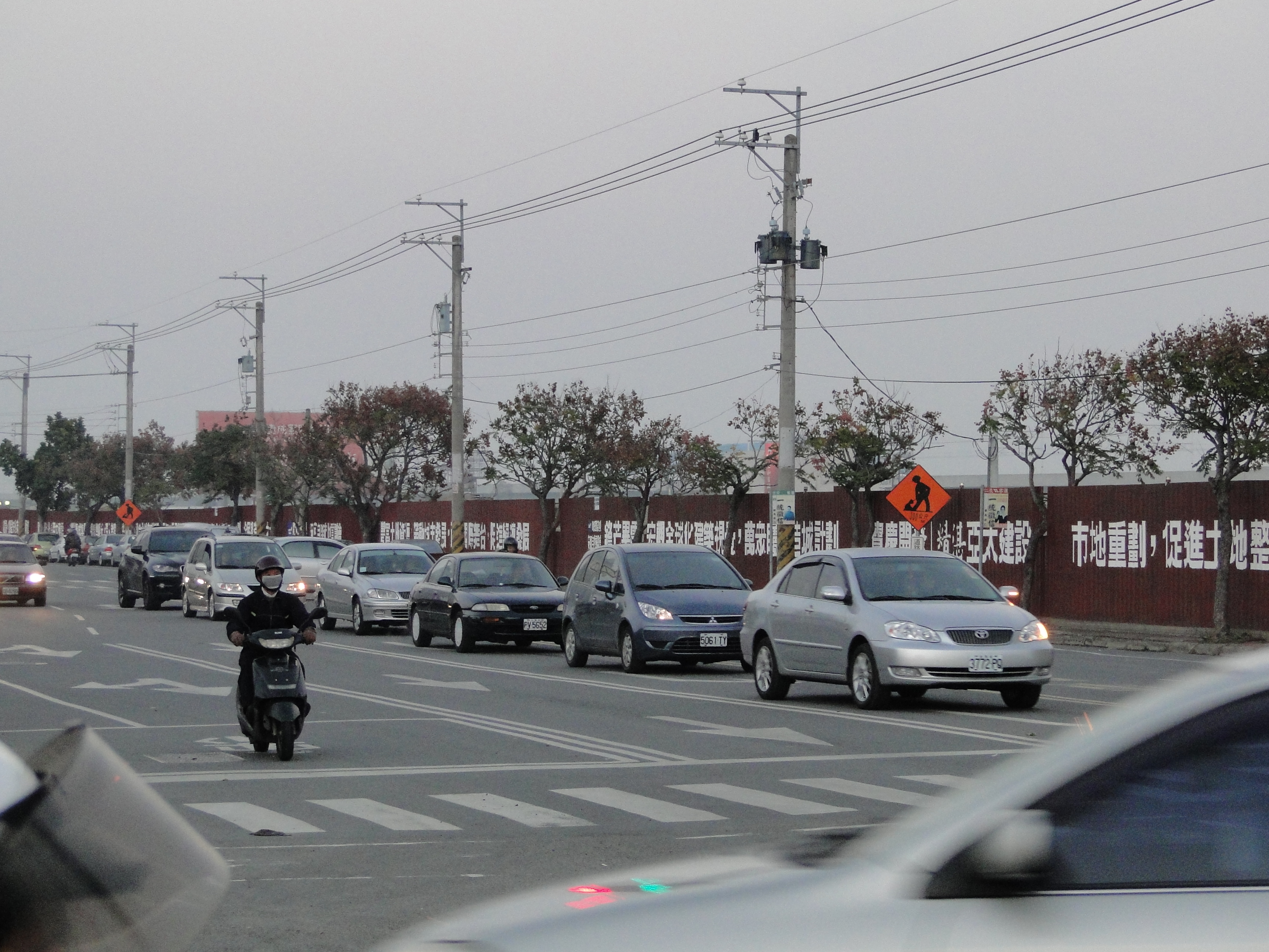 中文（台灣）: 台灣台中市安和路一景。